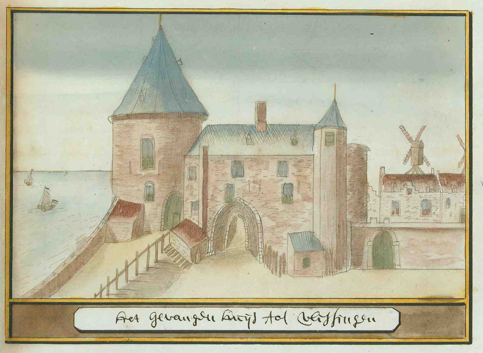 Beschryvinge van Zeeland